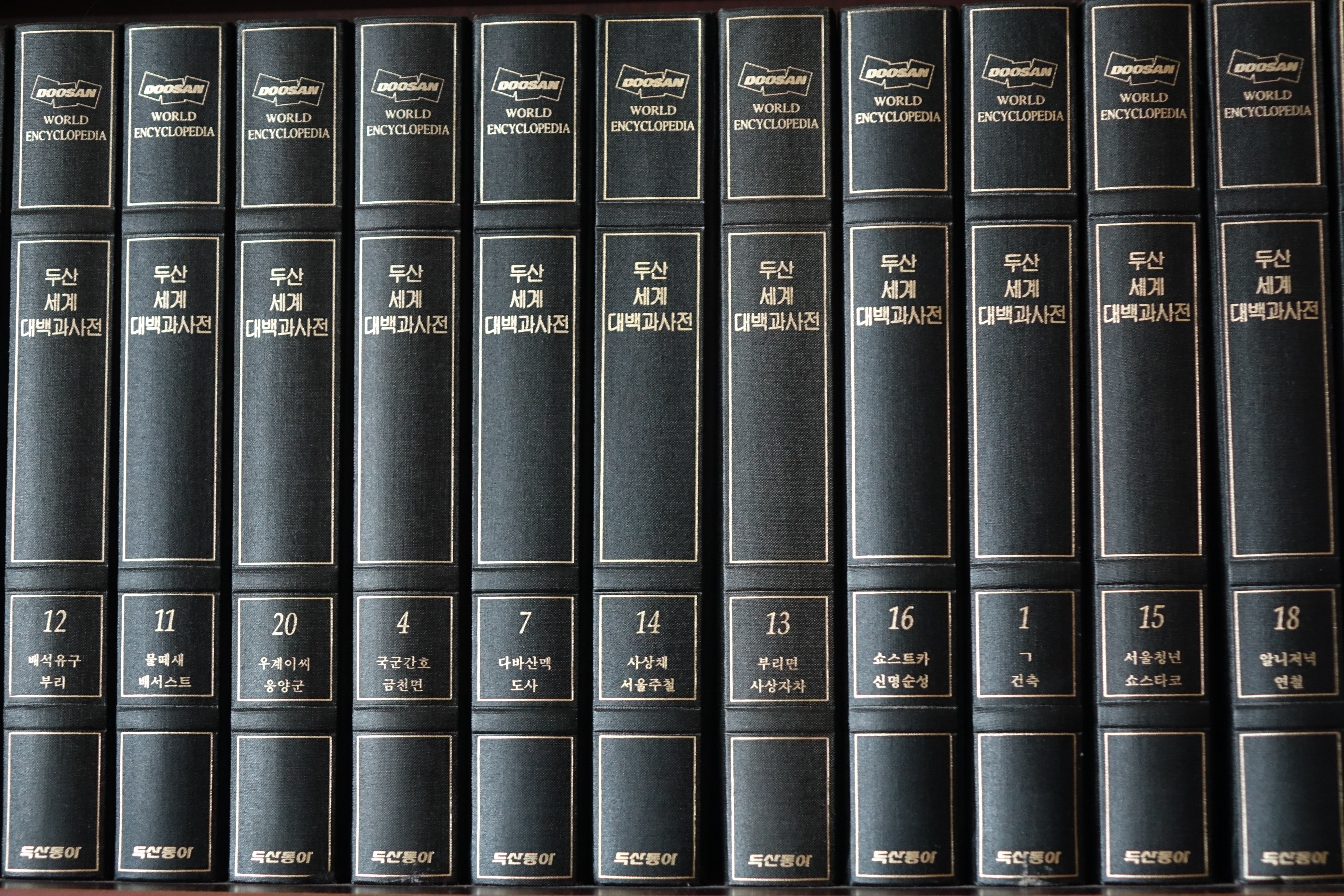 20150220-20150220 최광모 촬영